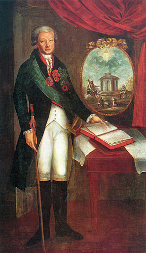 Мельгунов, Алексей Петрович, ярославский и вологодский генерал-губернатор, холст, масло. 212*124